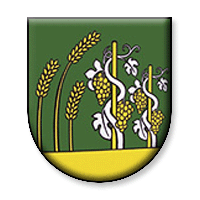 Erb obce Rapovce